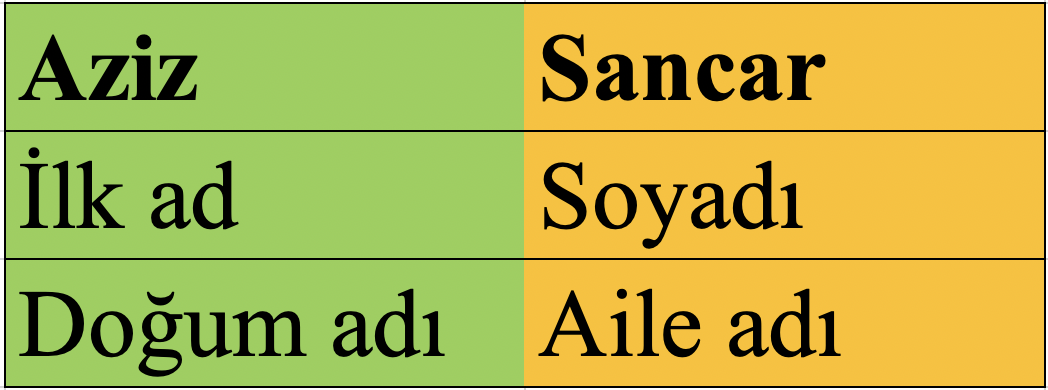 "Aziz Sancar" isminde görüldüğü üzere "Aziz" kişinin ilk adı aynı zamanda doğum adı, "Sancar" ise soyadıdır.